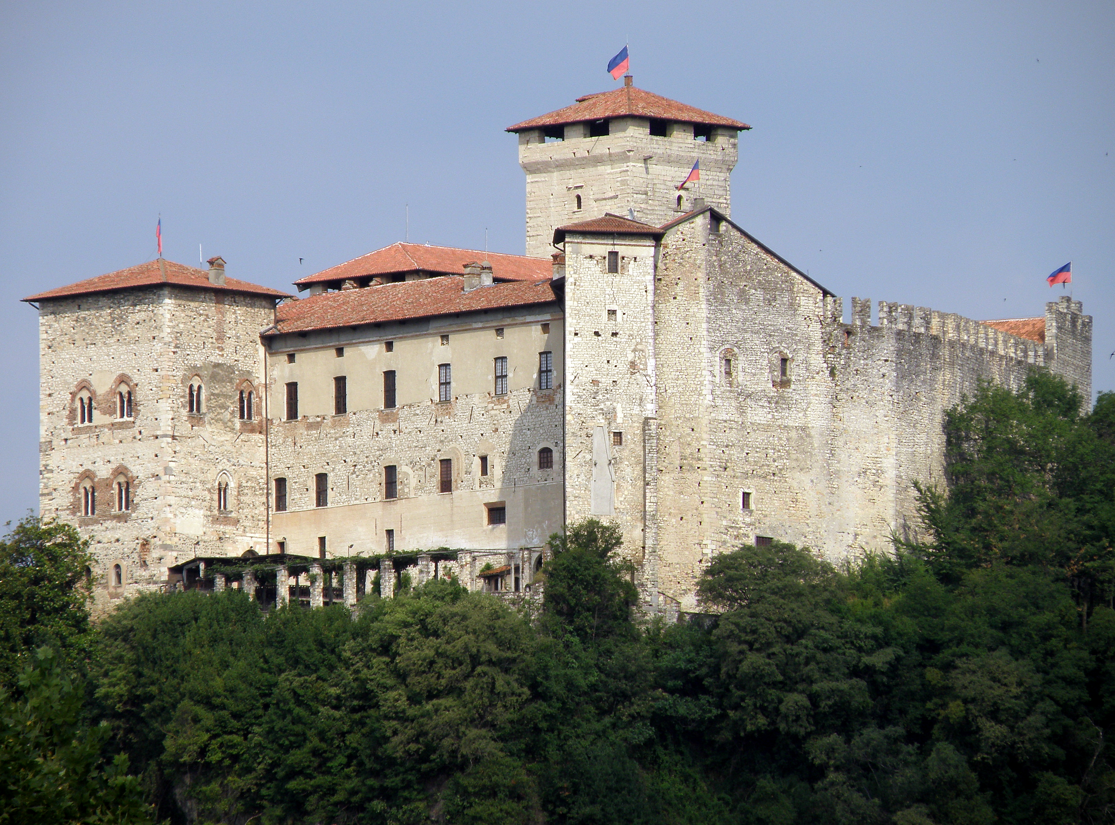 Forteresse d'Angera (en italien Rocca di Angera), surplombant la localité italienne d'Angera, dans la province de Varèse, sur la rive orientale (lombarde) du lac Majeur. Flancs sud (à gauche) et est (à droite).